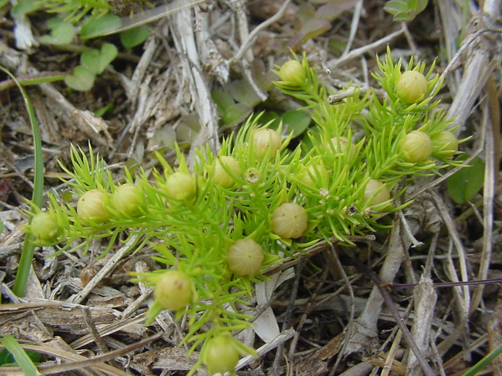 Cliococca selaginoides - LINACEAE - Torres - RS - Brasil